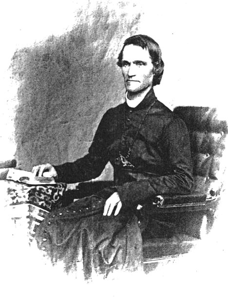 Le Père Antoine Marie Garin